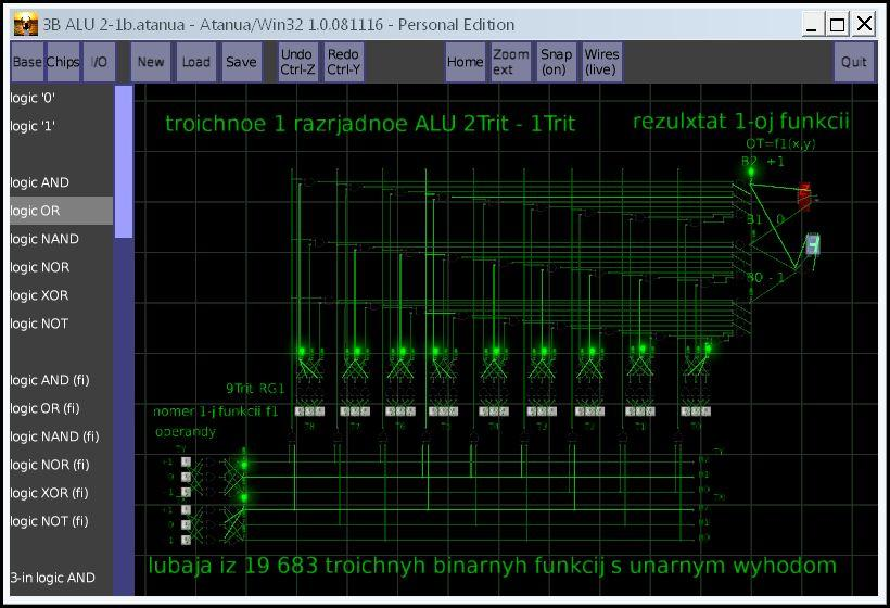 Одноразрядное бинарное с унарным выходом троичное АЛУ в трёхбитной одноединичной системе троичных логических элементов.